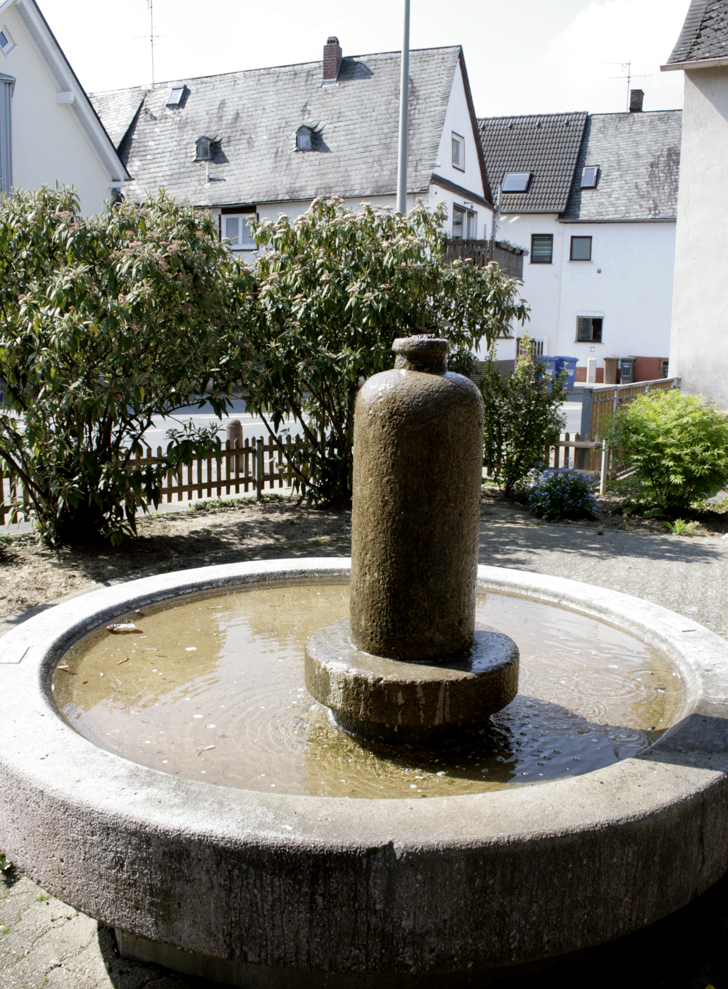 Brunnen in Flaschenform in Dauborn, Deutschland